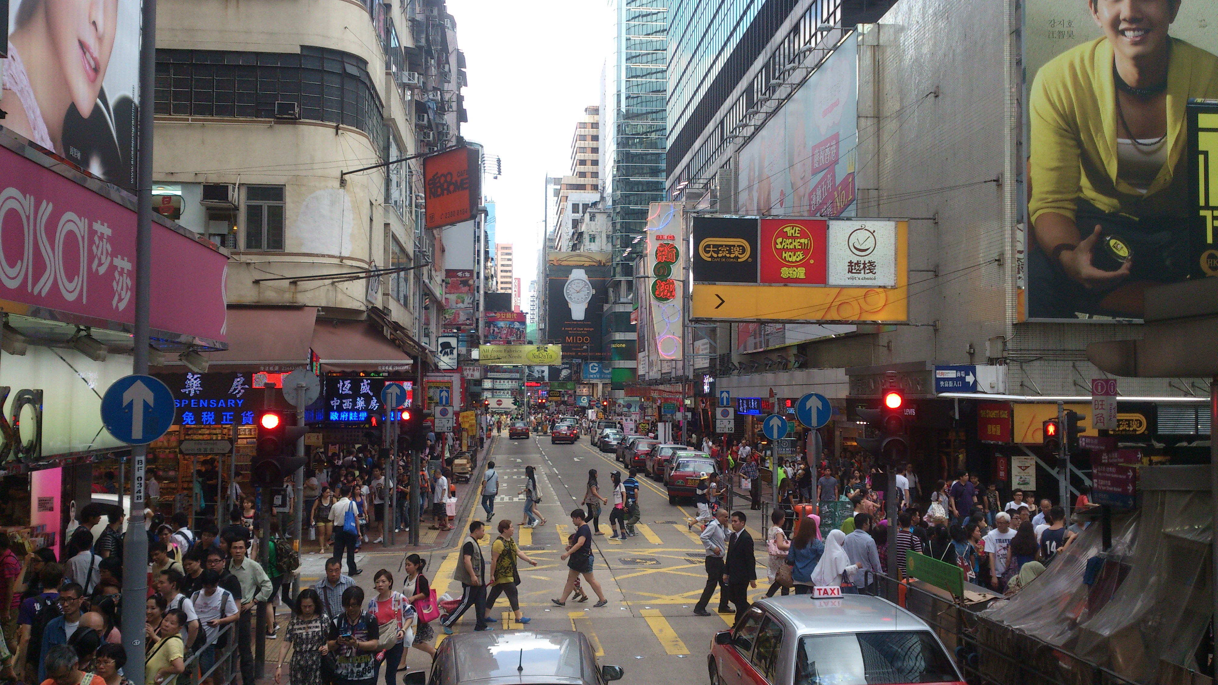 Mong Kok, Hong Kong